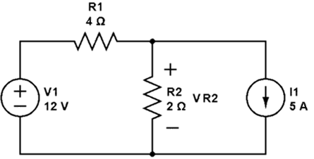 Circuito contendo fonte de tensão, fonte de corrente e resistores.